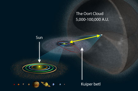 ตำแหน่ง บริเวณเมฆออร์ต (Oort Cloud) ห่างใกล้และกว้างใหญ่ไพศาล